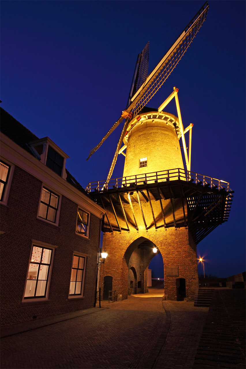 De Rijn en Lek is een korenmolen in Wijk bij Duurstede in de provincie Utrecht.